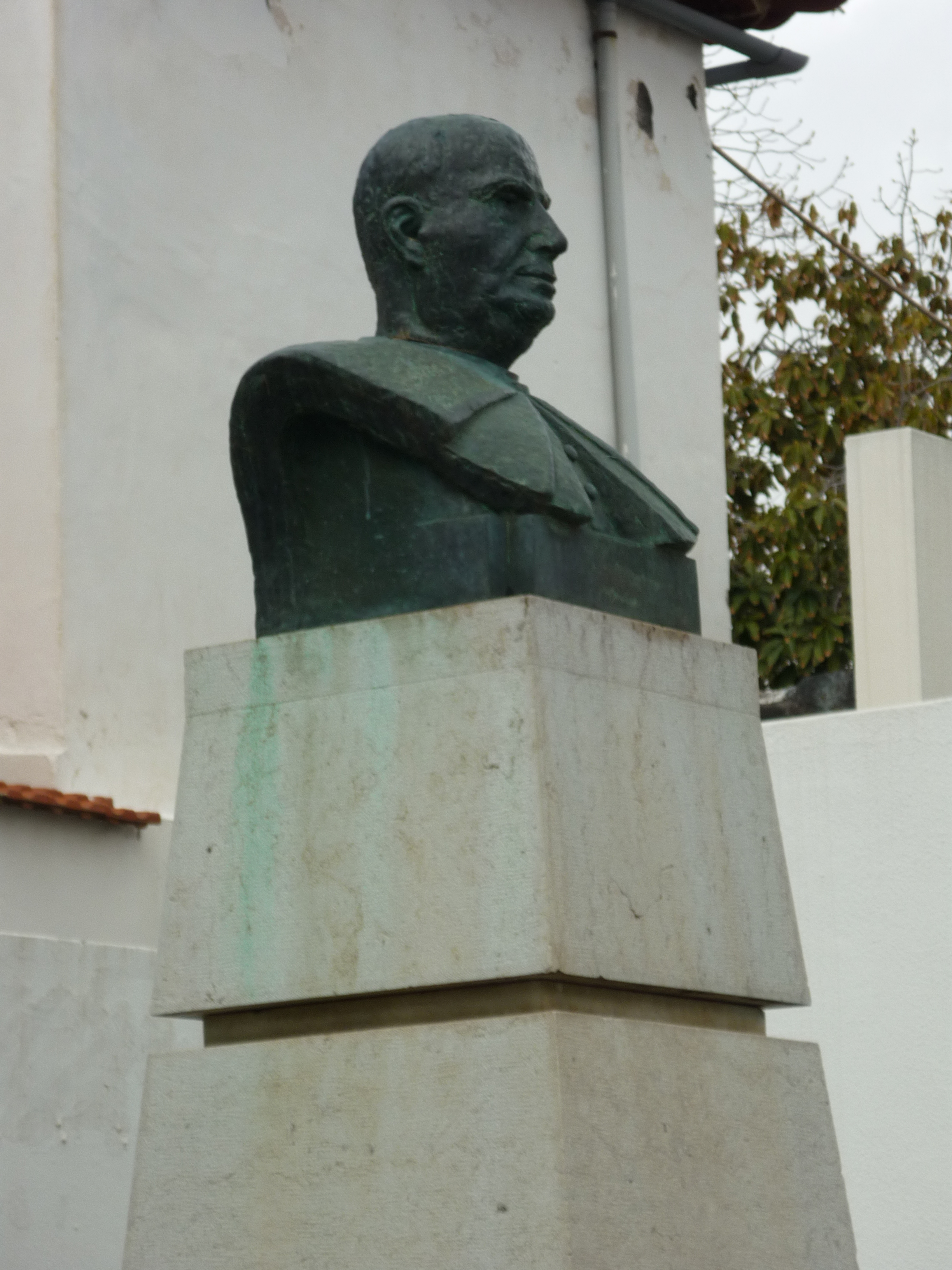 Padre Laurindo mellszobra az óvárosi plébániatemplom előkertjében, Funchal (Madeira)